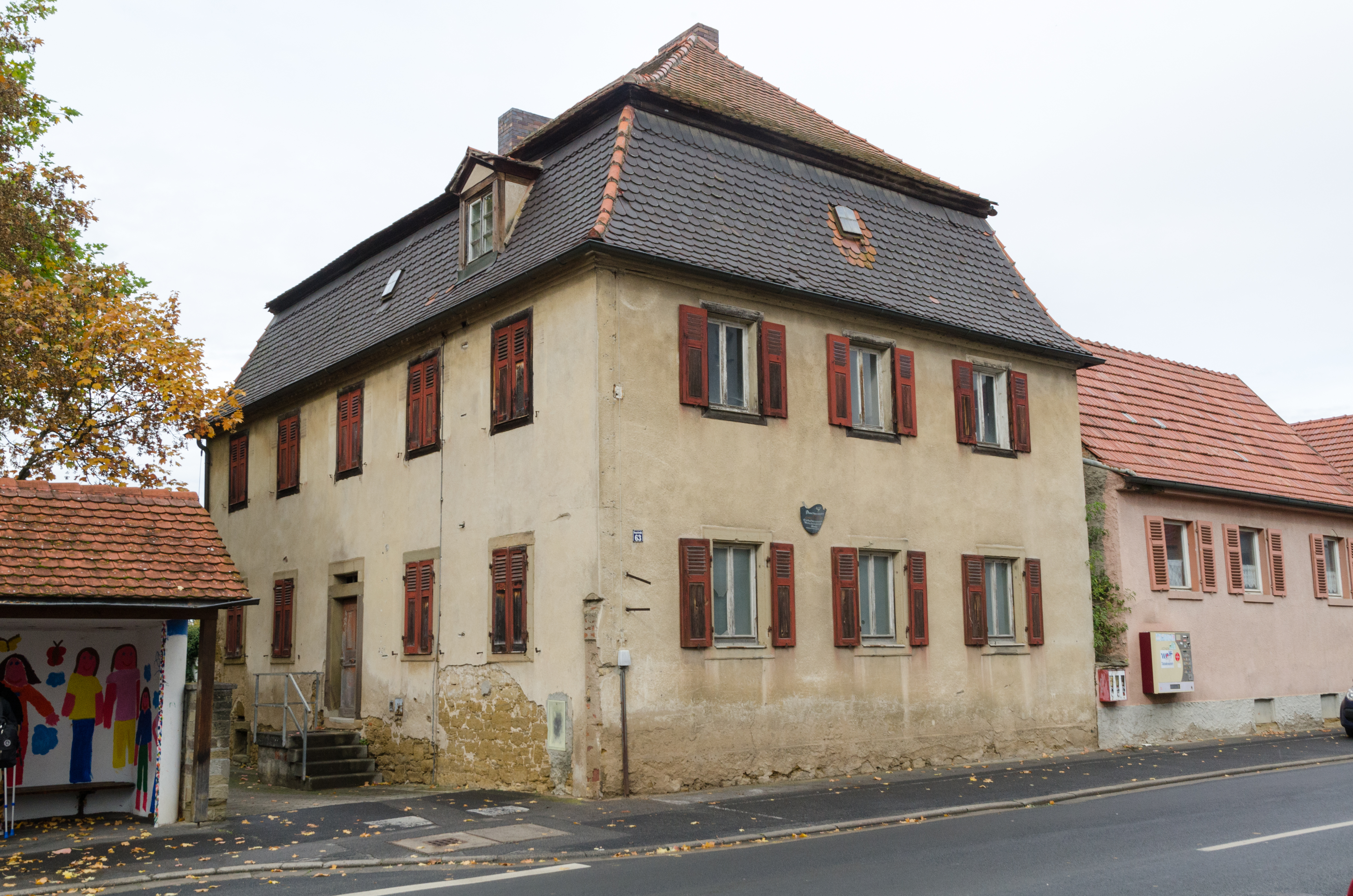 Röthlein, Hauptstraße 63